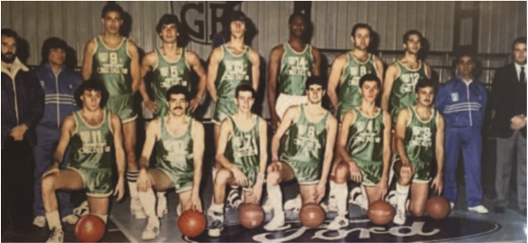 Foto del equipo de Gimnasia y Esgrima de Comodoro Rivadavia de 1989 que logró el ascenso a la Liga Nacional de Básquet al ganar la segunda división.